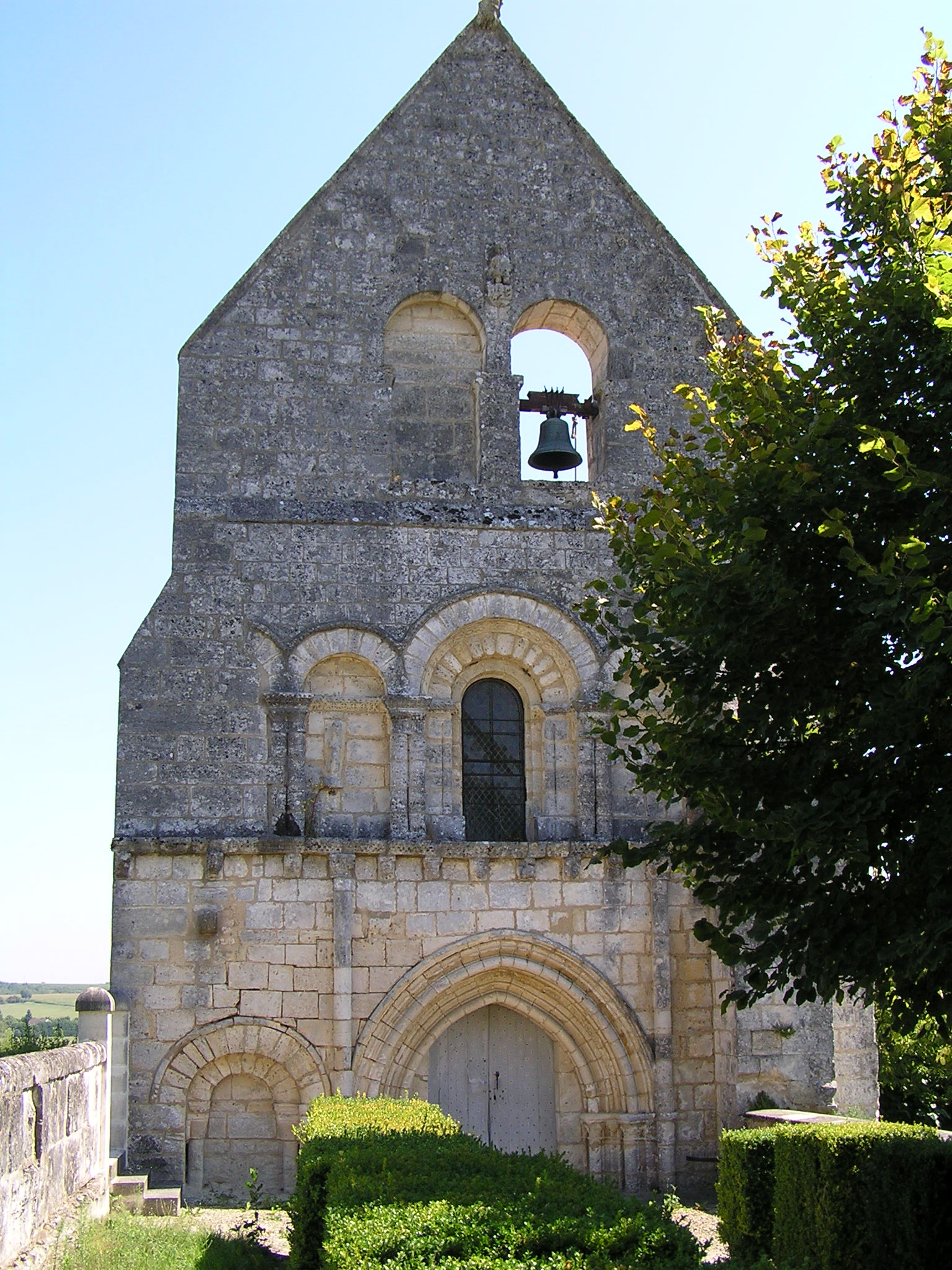 église d'Eraville, Charente, France